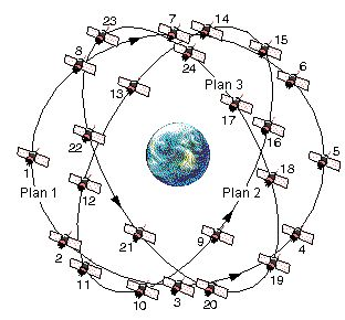 GLONASS